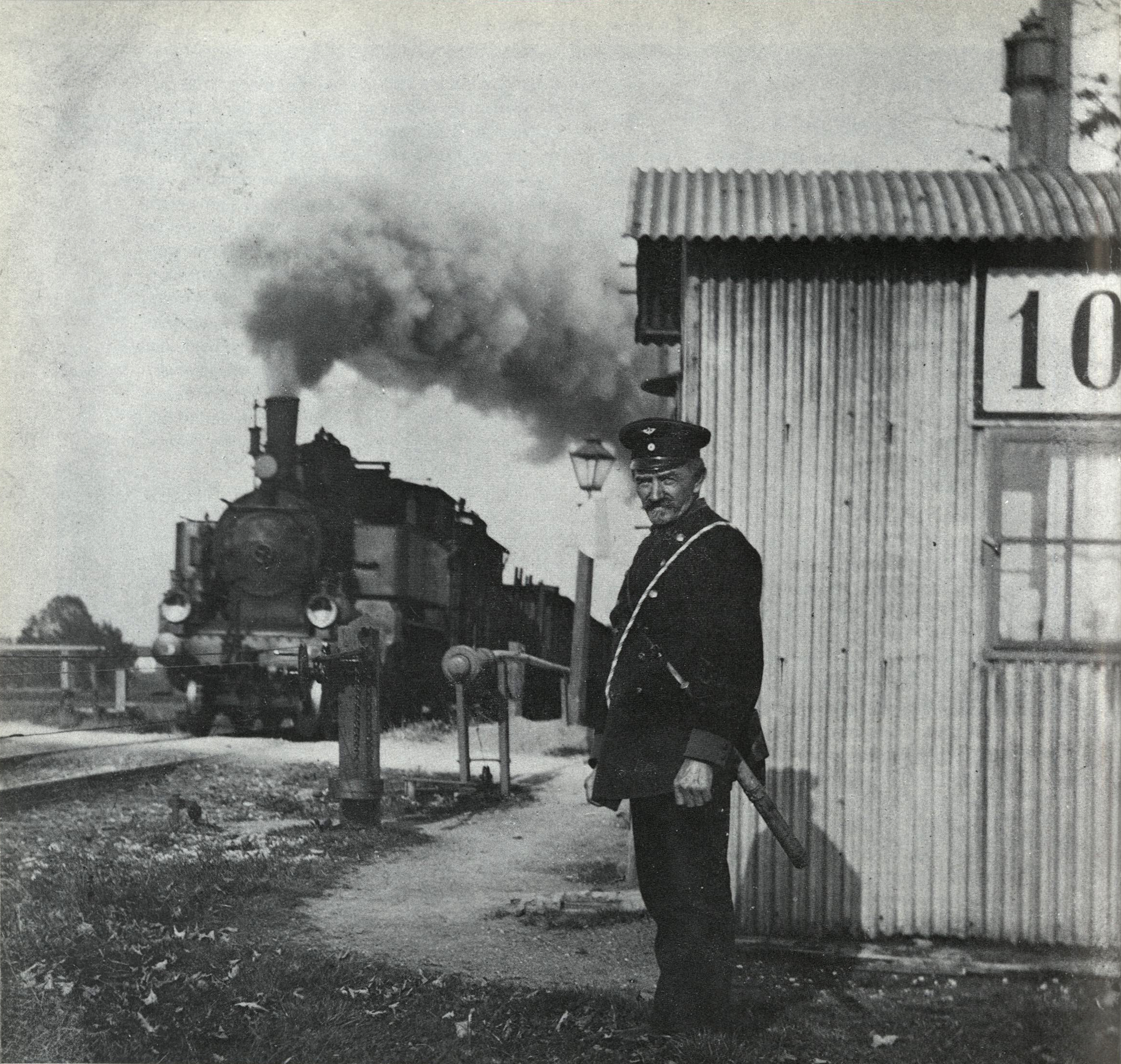 Bahnwärter Simon Faschinger am Schrankenposten 10 der Bahnstrecke München–Simbach nahe Hörlkofen. Eine Dampflokomotive der bayerischen Gattung D XII überquert mit einem Güterzug den Bahnübergang.